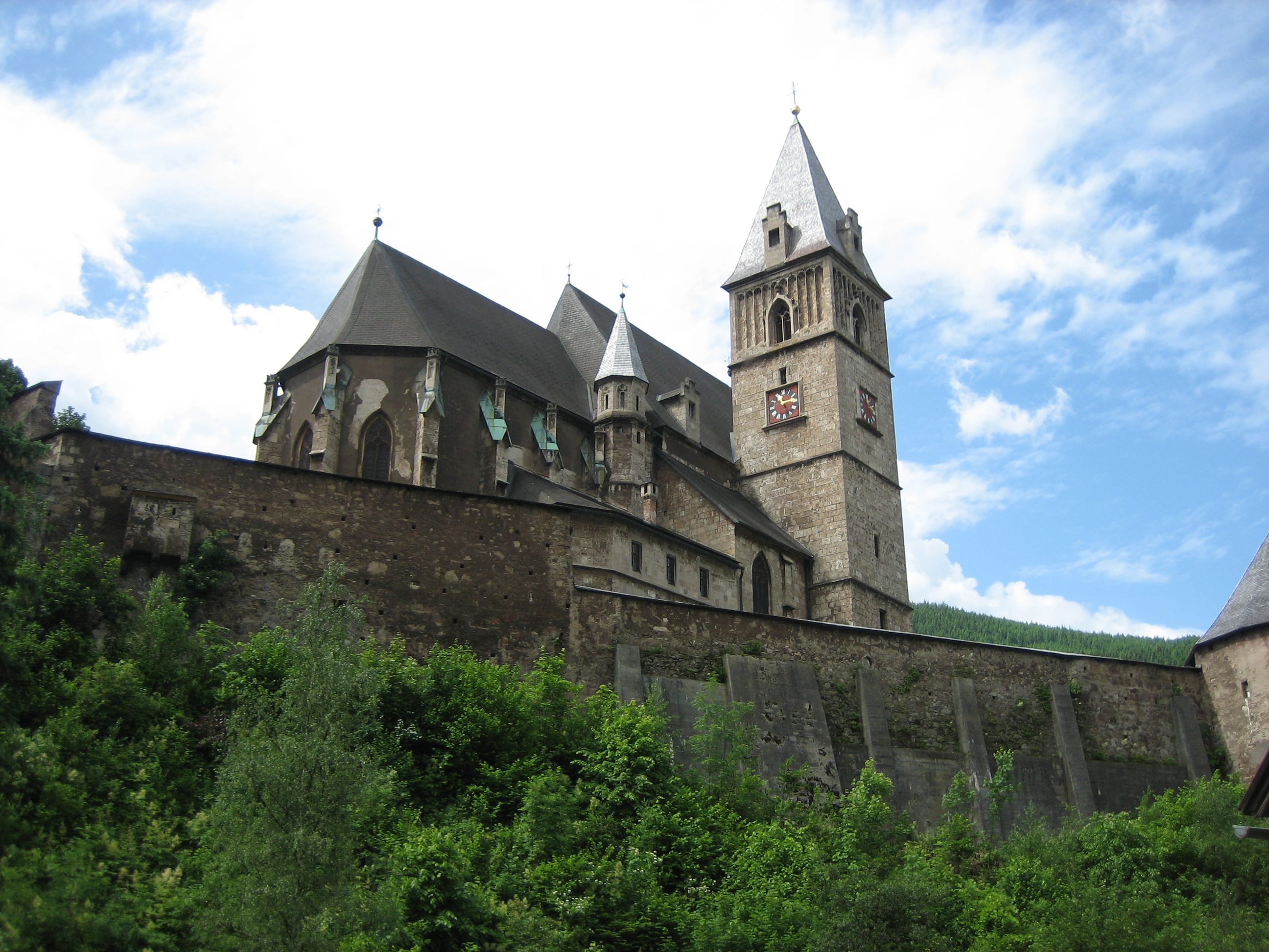 Church St. Oswald in Eisenerz, Styria, Austria.